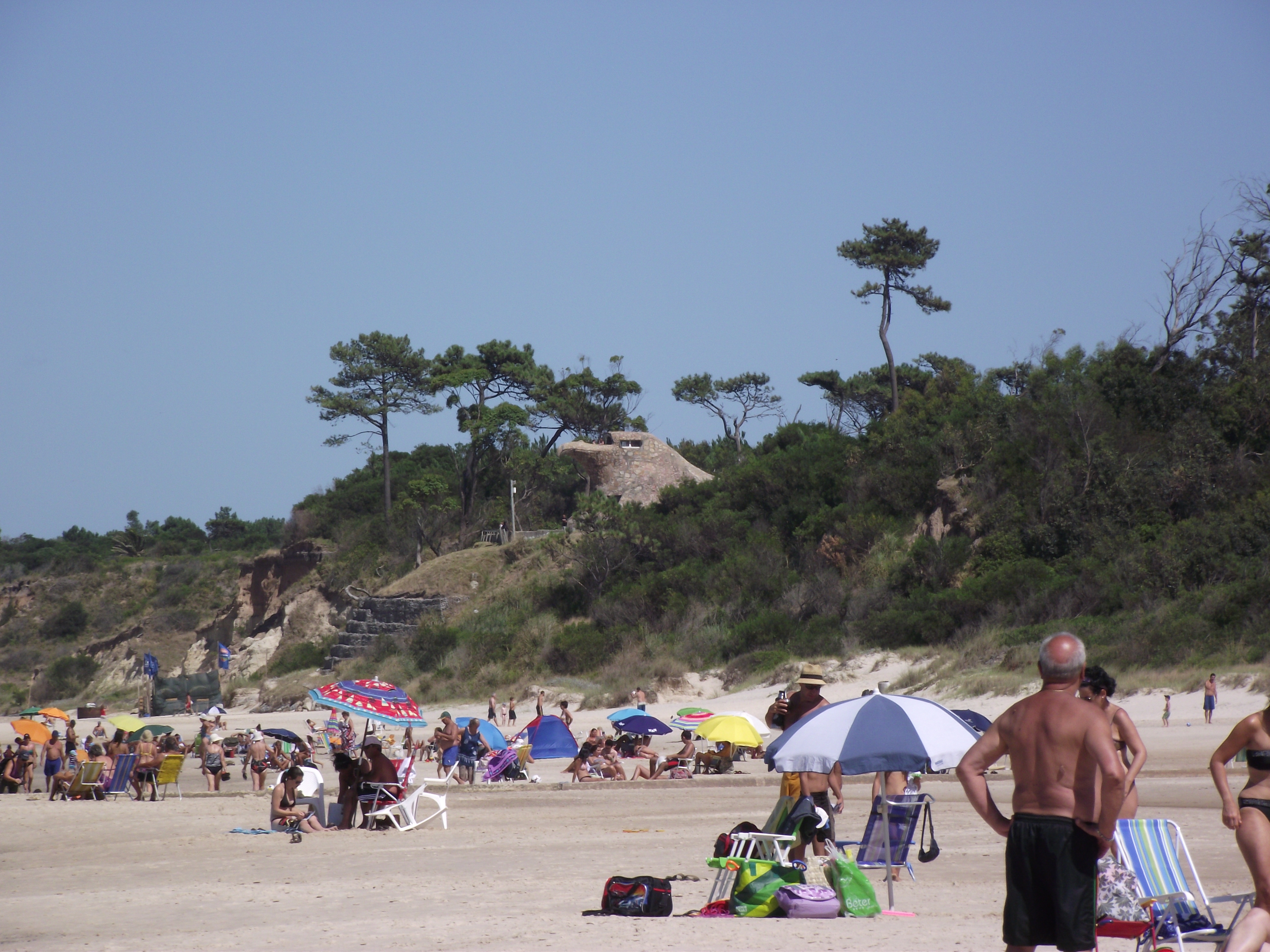 El Águila. Ubicada en el departamento de Canelones